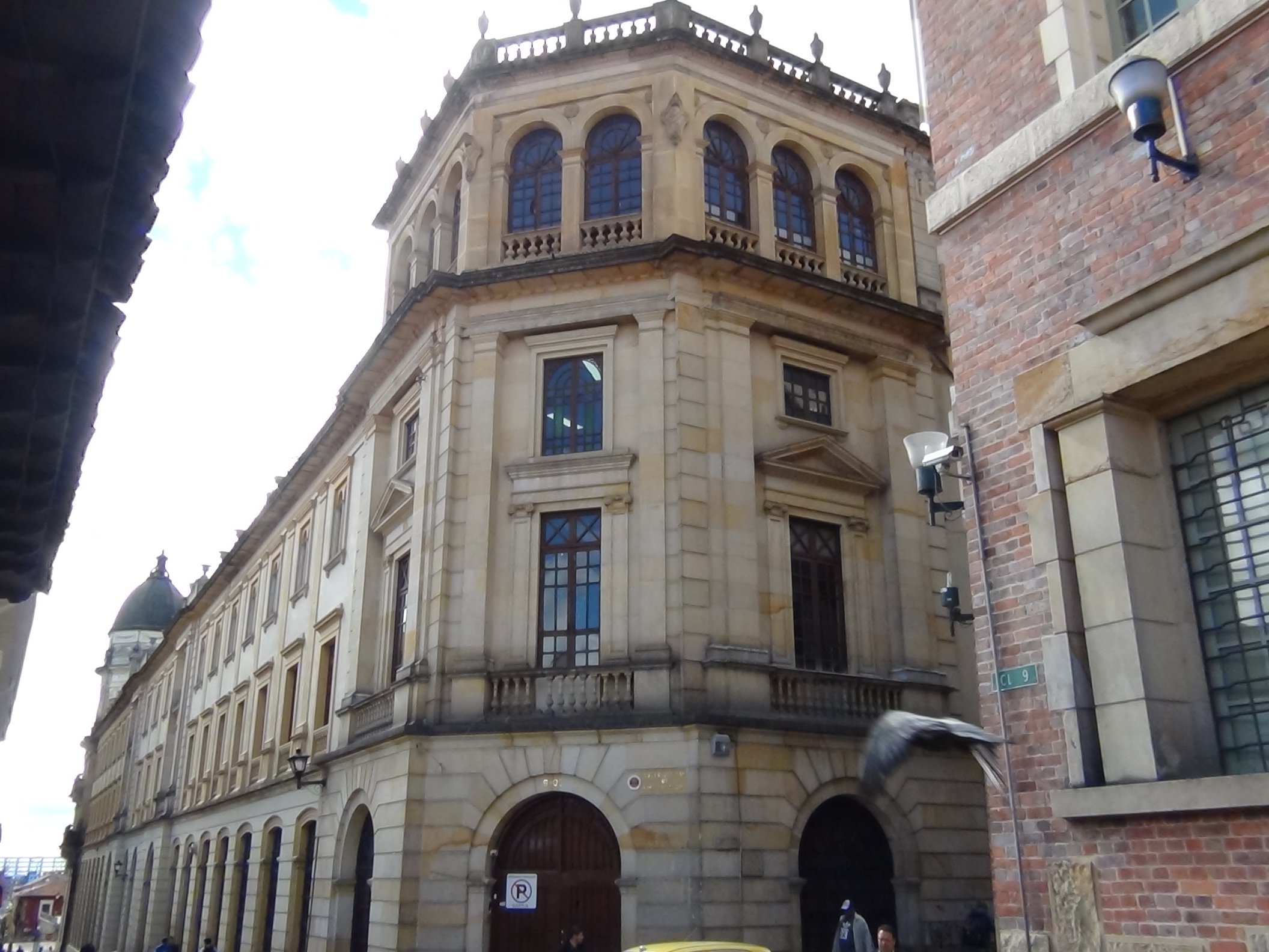 Detalle del edificio sobre la Calle 9 con Carrera 6.